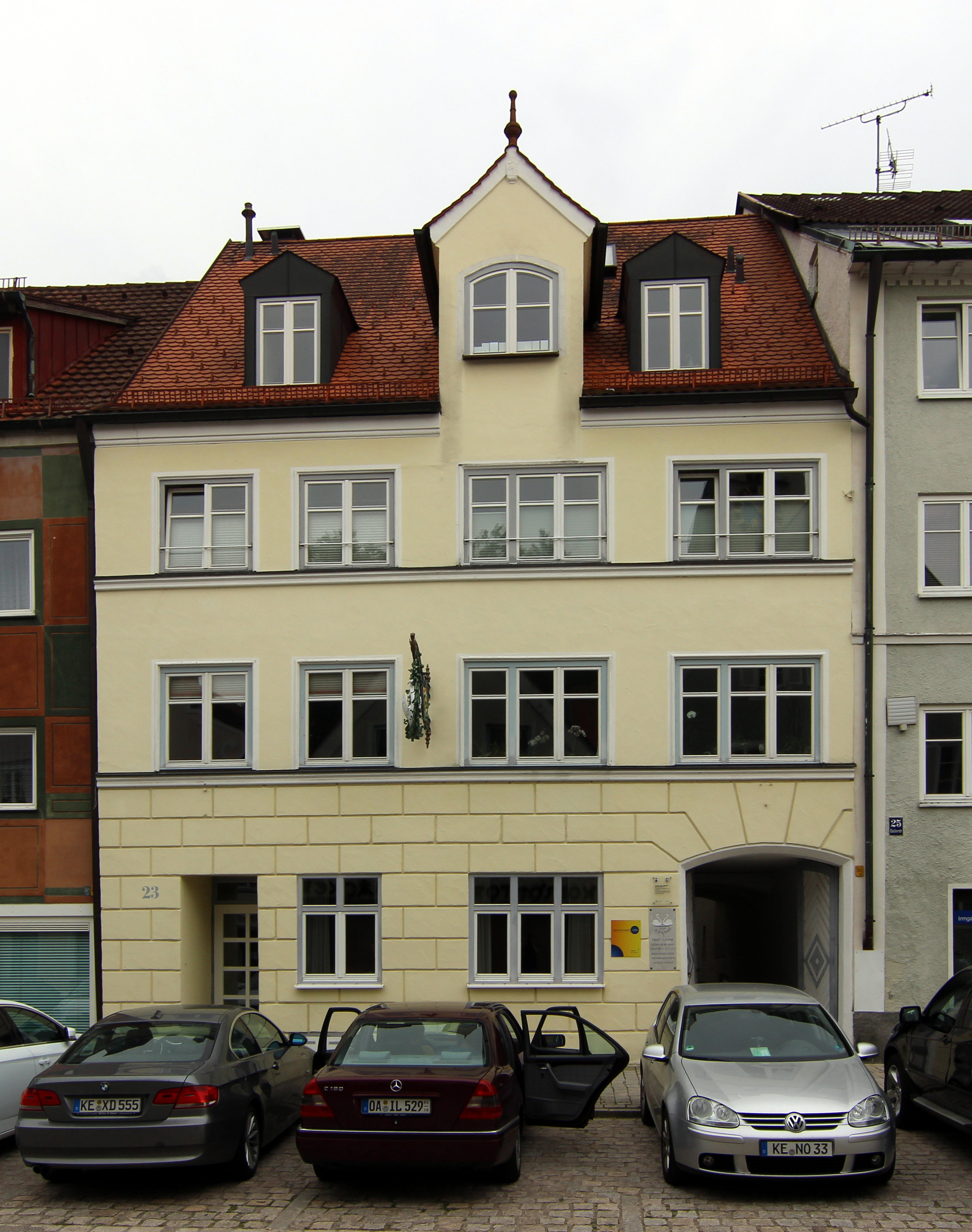 Gasthaus zum Schwanen, Bäckerstraße, Kempten